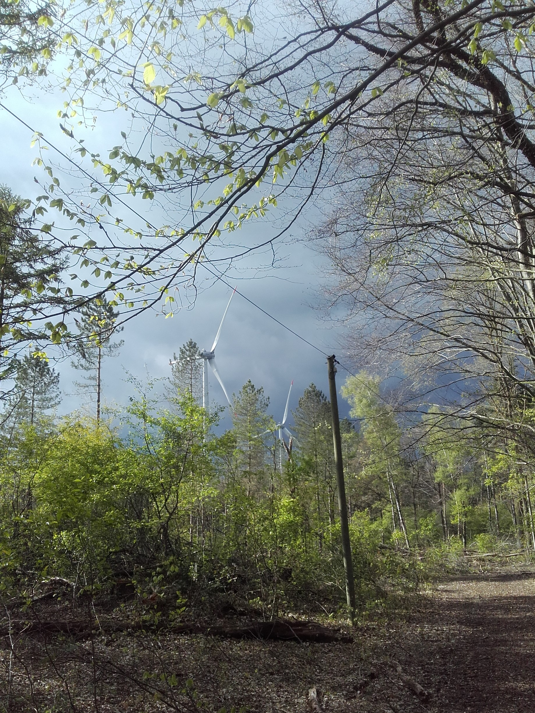 Kalbecker Forst im Landschaftsschutzgebiet LSG-4302-0002 Die Gebiete Kalbeck, Vorselaer, Grafendonk, Grotendonk, Berberheide, Schravelner Heide, Knappheide, Baalerbruch, Gocher Veen, Weezer Veen, Wember Veen, Hees, Laarbruch